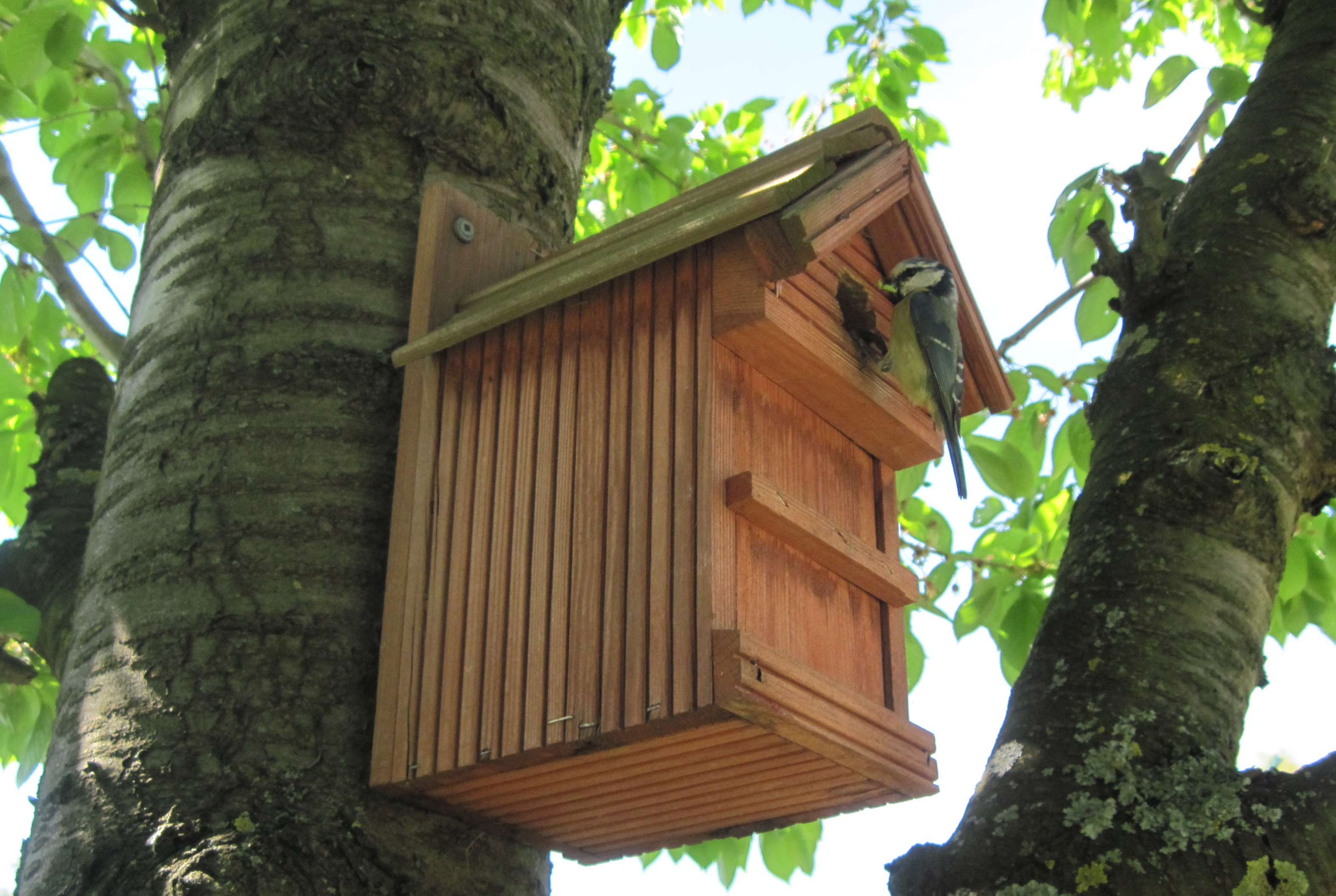 Am Kirschbaum im Schrebergarten im besiedelten Flachland Niedersachsens angebrachter und bereits mehrmals zur Fortpflanzung genutzter Nistkasten: Blaumeise im Anflug an ihre "Wohnung" mit Futter für die bereits geschlüpften 4 Jungtiere zur Fütterung